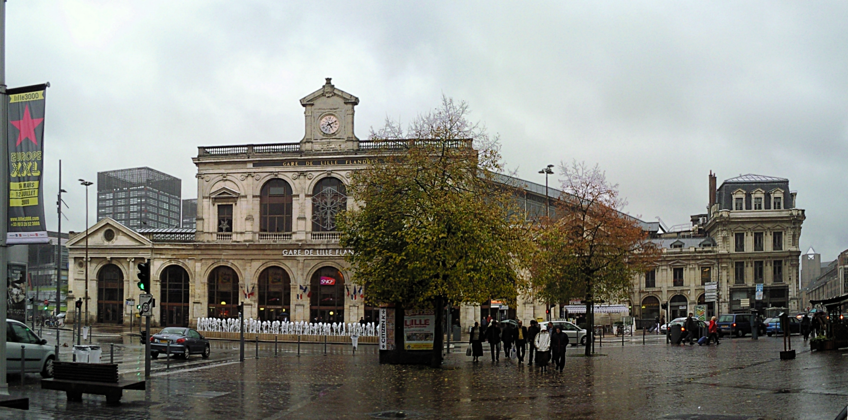 La gare Lille-Flandres à Lille (Nord). Sa façade est la façade originelle de la gare du Nord de Paris, démontée et reconstruite à Lille entre 1869 à 1892 par les architectes Léonce Reynaud et Sydney Dunnett.